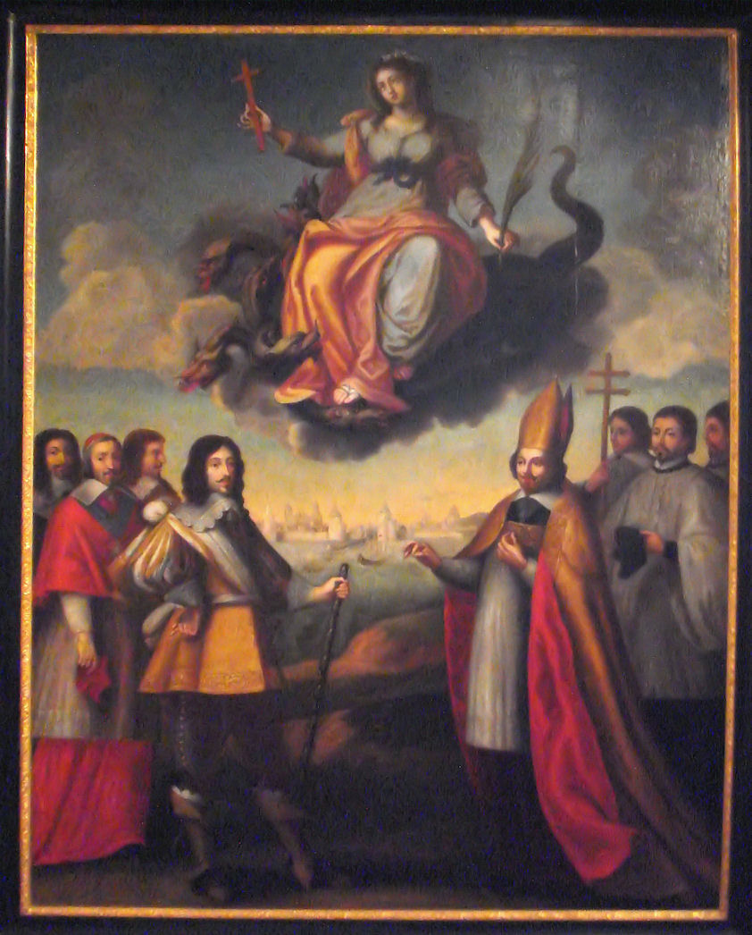 Entrée de Louis XIII à La Rochelle